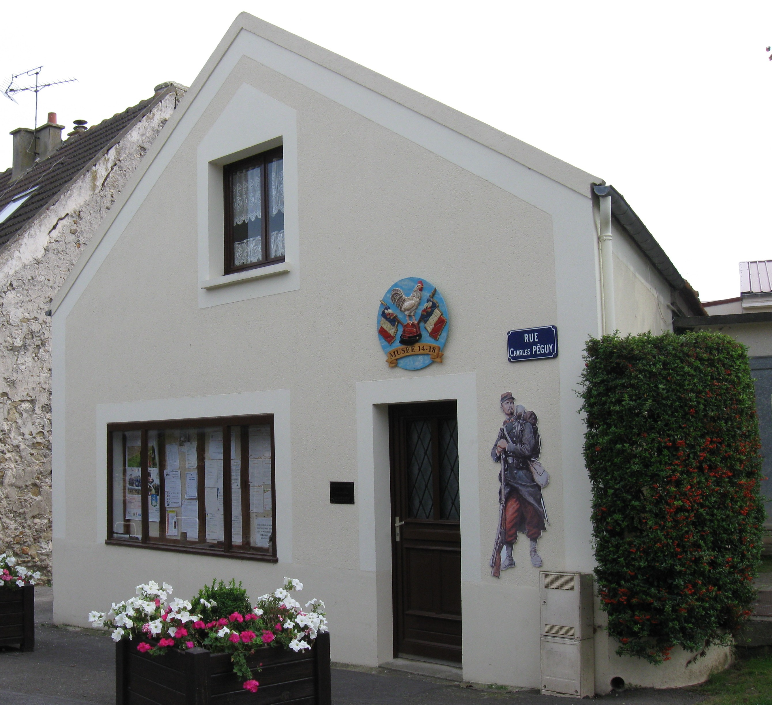 Musée de la guerre 14/18 de Villeroy. (Seine-et-Marne, région Île-de-France).